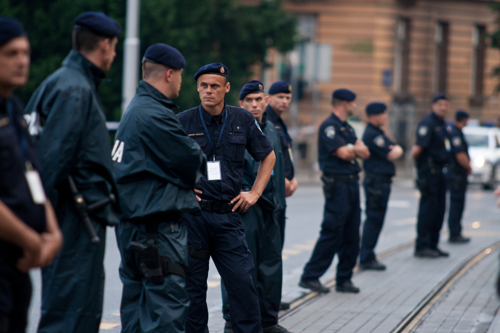 Hrvatska policija na zagrebačkim ulicama tijekom dvodnevnog apostolskog posjeta pape Benedikta XVI. Hrvatskoj.